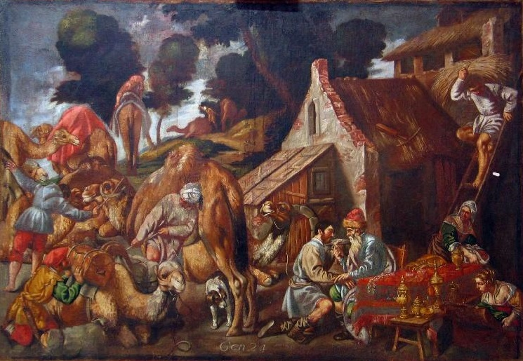 La obra representa a Abraham éncargándole a su criado Eliezer que buscase una esposa para su hijo Isaac, y forma parte de la serie de nueve lienzos sobre Abraham, Isaac y Jacob que se encuentra en el Museo de León y que fue ejecutada por el taller de Pedro de Orrente en el siglo XVII.